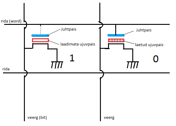 EPROM-i elektriskeemi ülevaade, kuidas juht- ja ujuvpaisu abil talletatakse mälupessa infot.